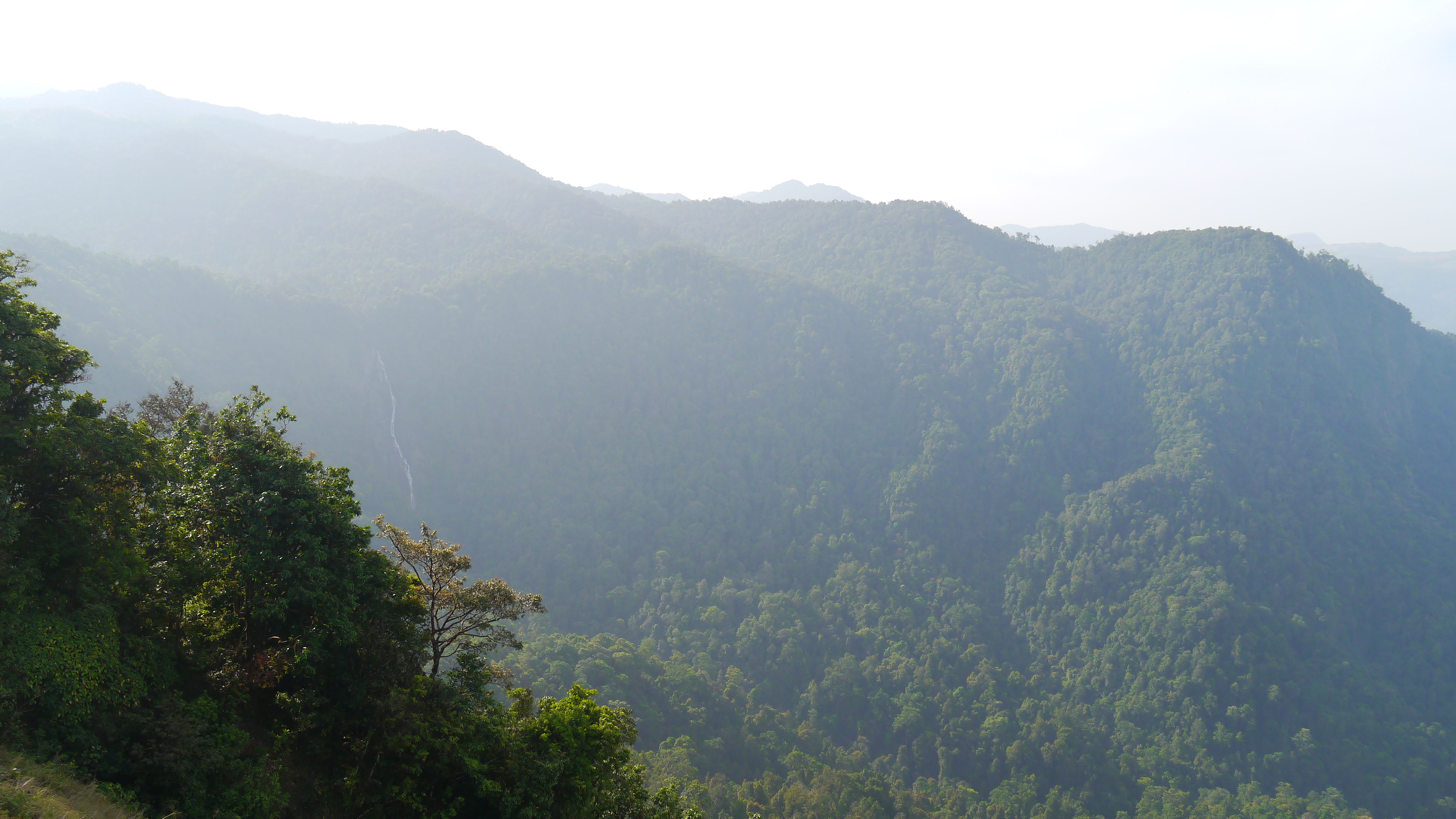 ... viewing Barkana Falls